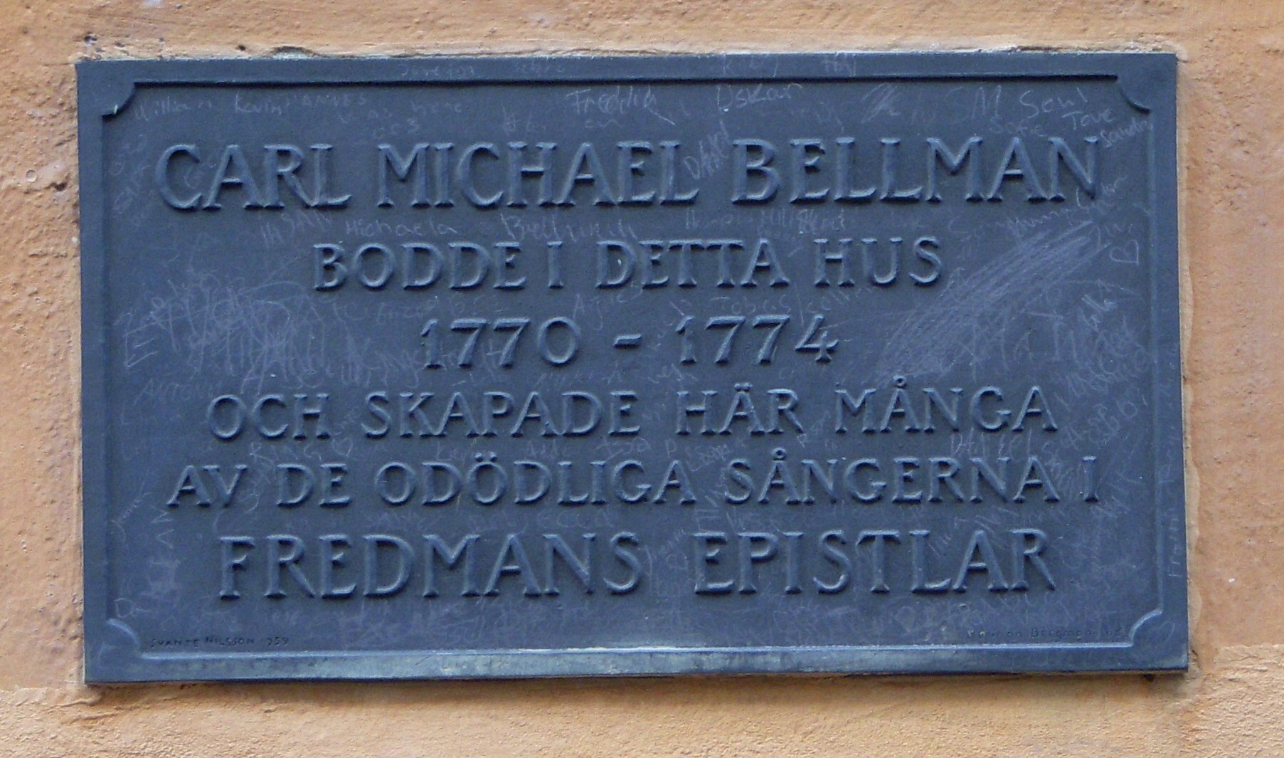 Bellmanhuset på Söder i Stockholm, infotavla på fasaden